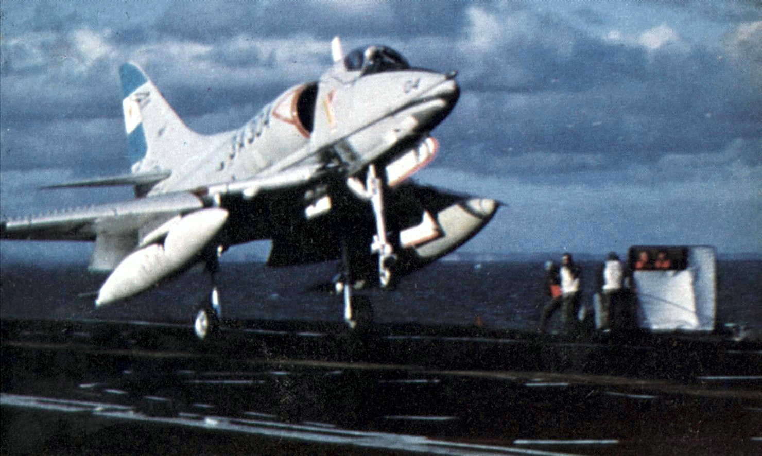 Skyhawk A4-Q del CANA decolando del ARA 25 de Mayo poco antes de las hostilidades.